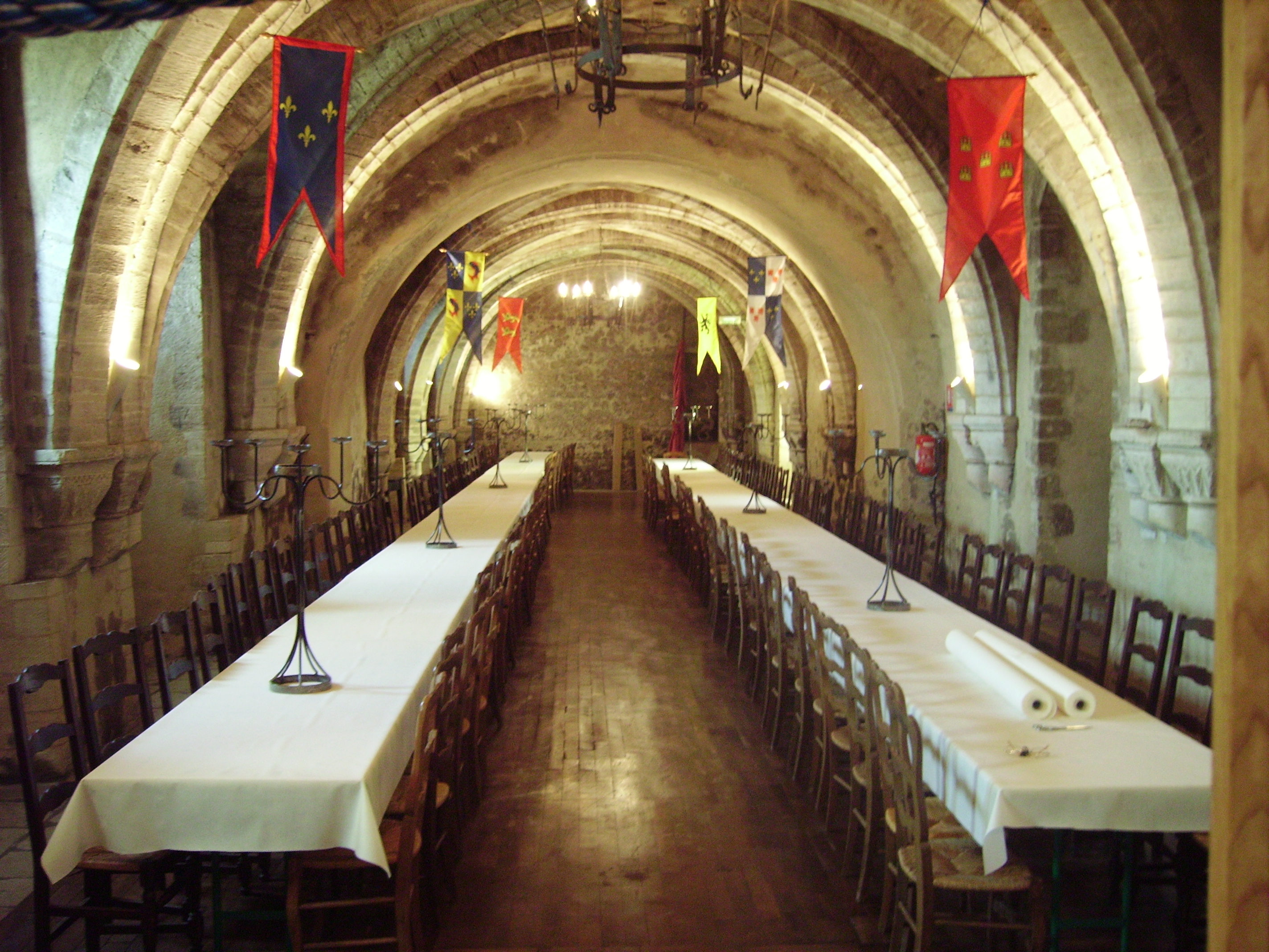 Chateau de Creully